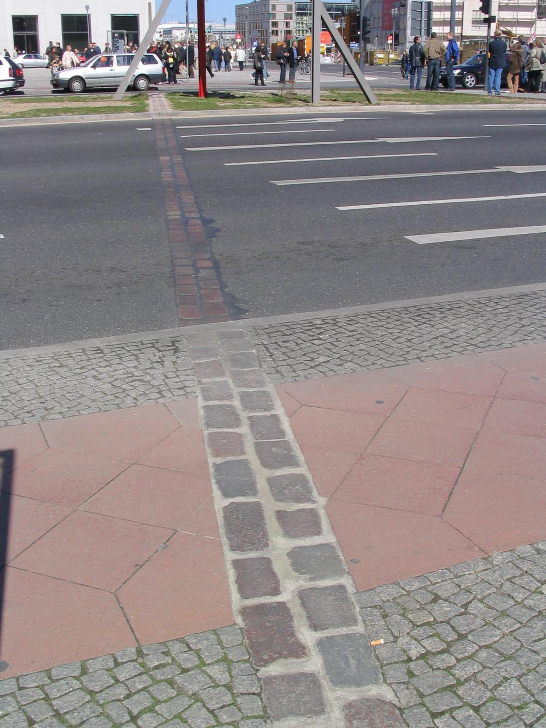 Ίχνη του Τείχους του Βερολίνου.wall shadow